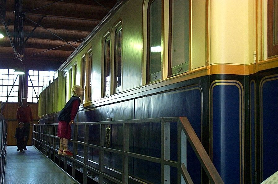 Salonwagen von Kaiser Wilhelm II. (Coach of Emperor Wilhelm II. of Germany) at "Deutsches Technikmuseum", Berlin, Germany